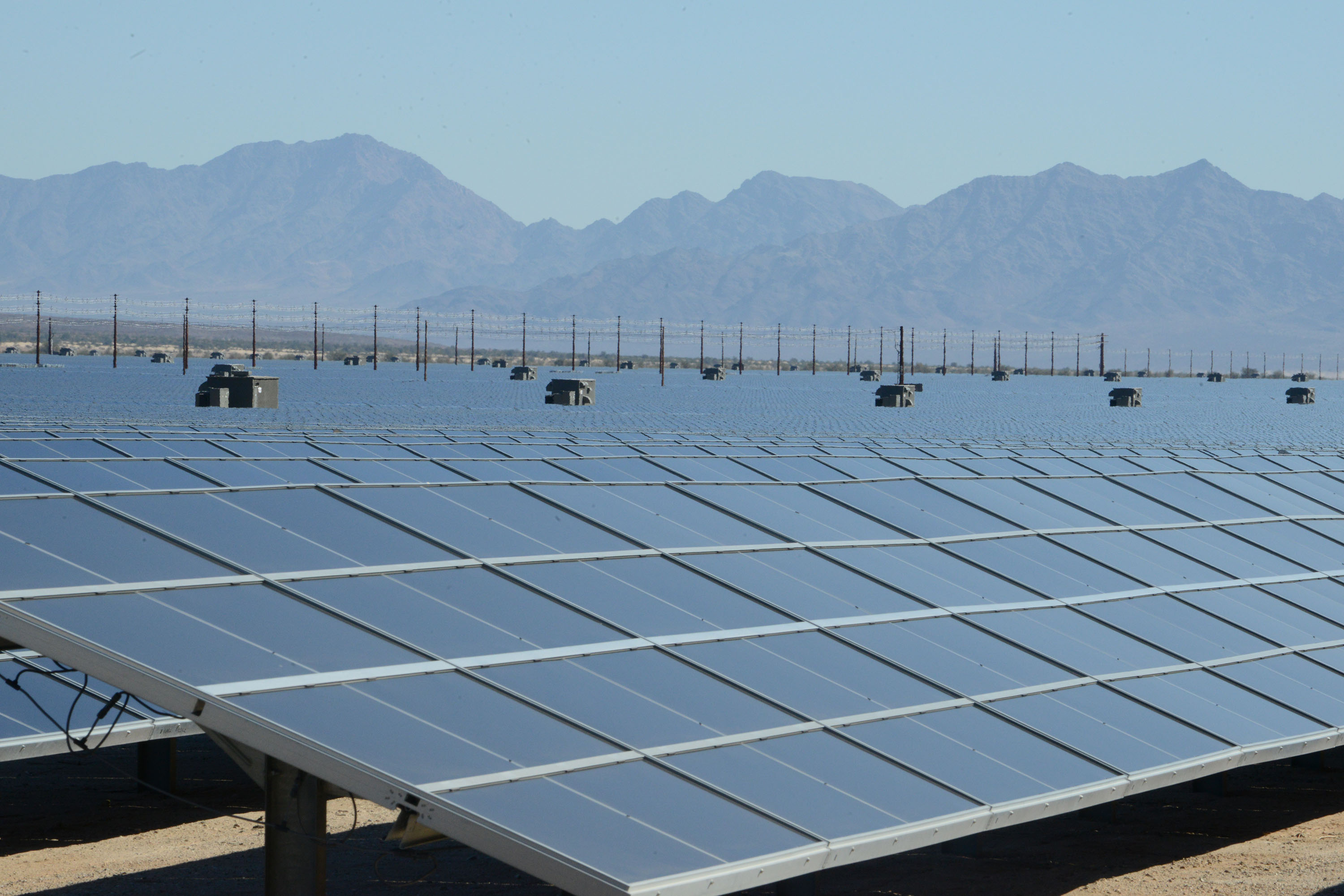 02-09-15 First Solar Desert Sunlight Solar Farm Desert Sunlight Solar Farm